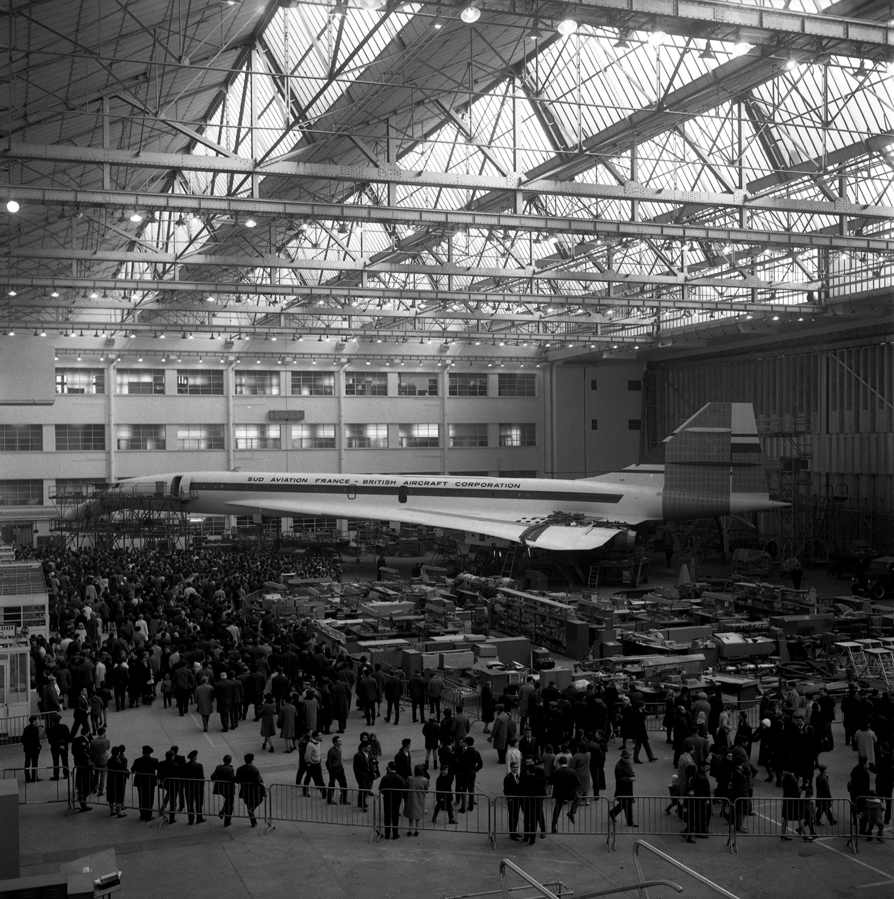 Ateliers Sud Aviation (Saint-Martin-du-Touch). 28 janvier 1968. Vue d'ensemble des visiteurs venus voir le Concorde : au 1er plan visiteurs de dos ; en arrière-plan le Concorde vu de côté. Cliché pris lors de la journée "portes ouvertes" organisée par Sud Aviation pour présenter le Concorde.